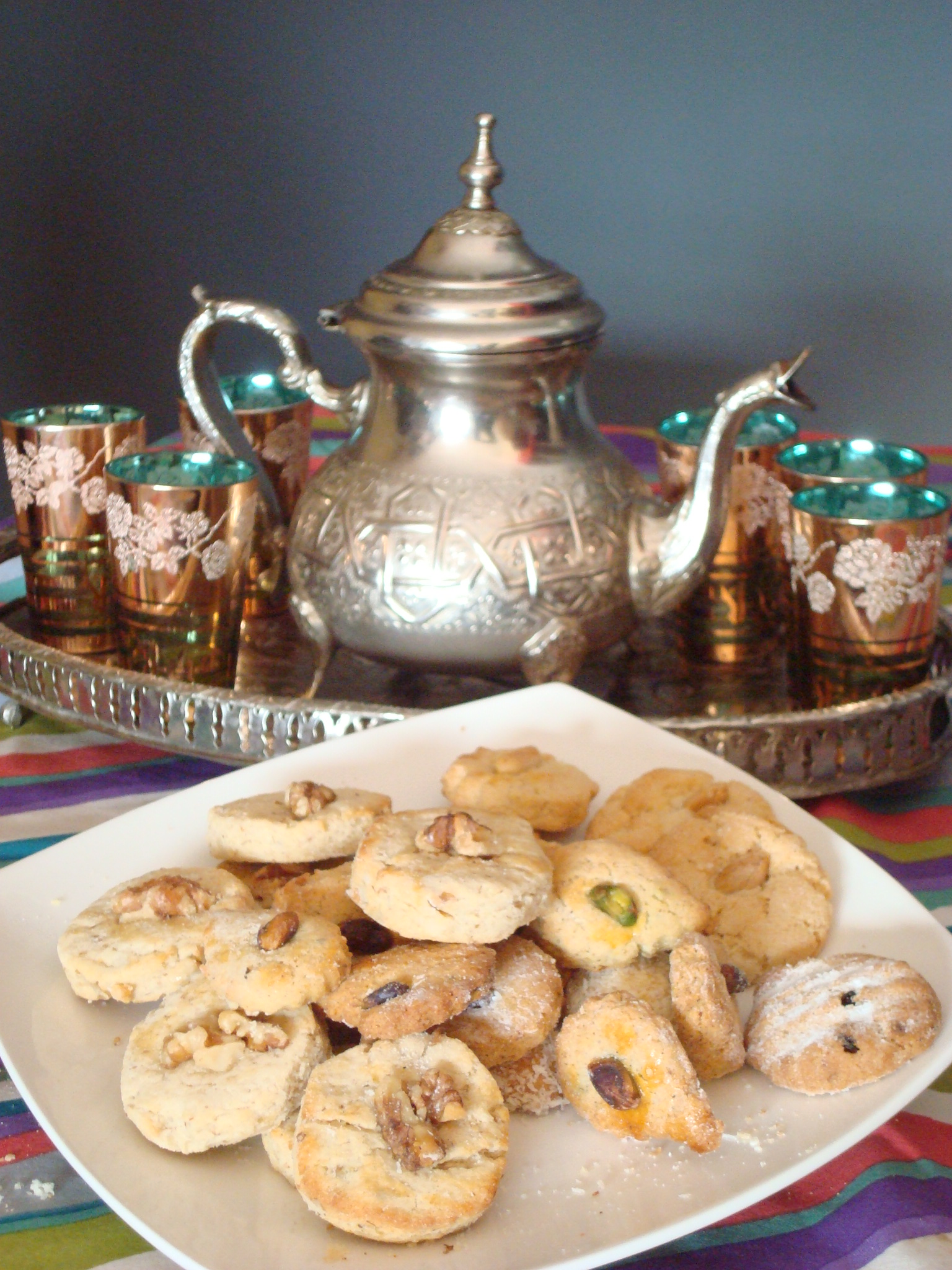 Te i pastes aid al adha